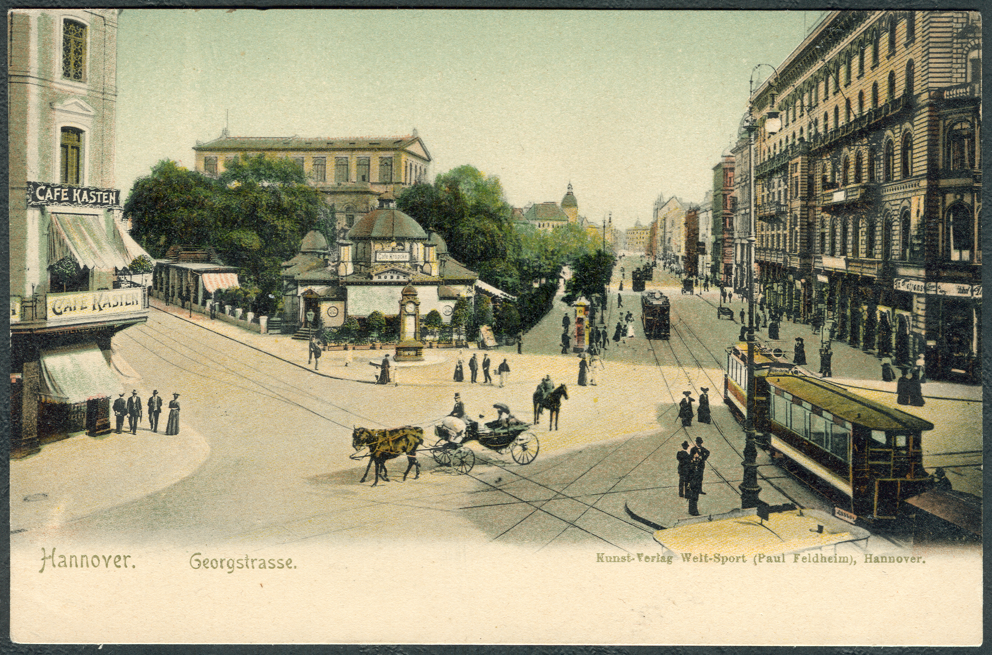 Fein kolorierte Ansichtskarte (Bildseite) aus dem „Kunst-Verlag Welt-Sport (Paul Feldheim), Hannover“ aus der Zeit um 1900 mit einem Blick von der Ecke Bahnhofstraße in Richtung Café Kröpcke und dem Opernhaus an der Georgstraße in Hannover. Im Vordergrund rechts ist ein hannoverscher Straßenbahn-Zug mit drei Wagen in Richtung Hildesheim zu erkennen ...